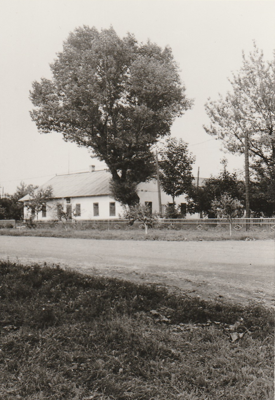 Statek pana Hrdiny v Nikolajevce, později jídelna kolchozu